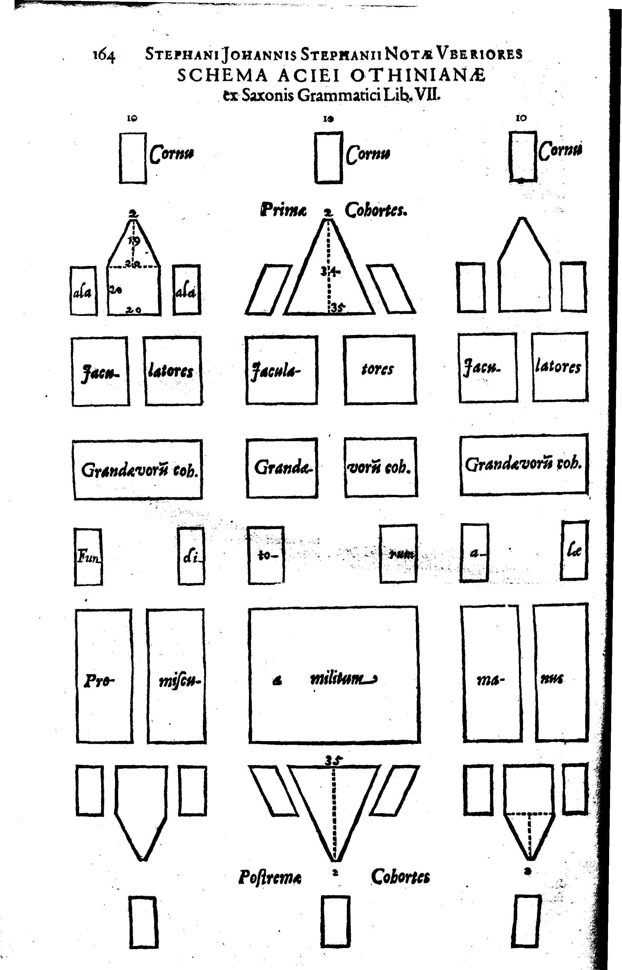 Die Schlachtaufstellung bei Saxo Grammaticus Historiae danicae VII, cap. 10, 6.